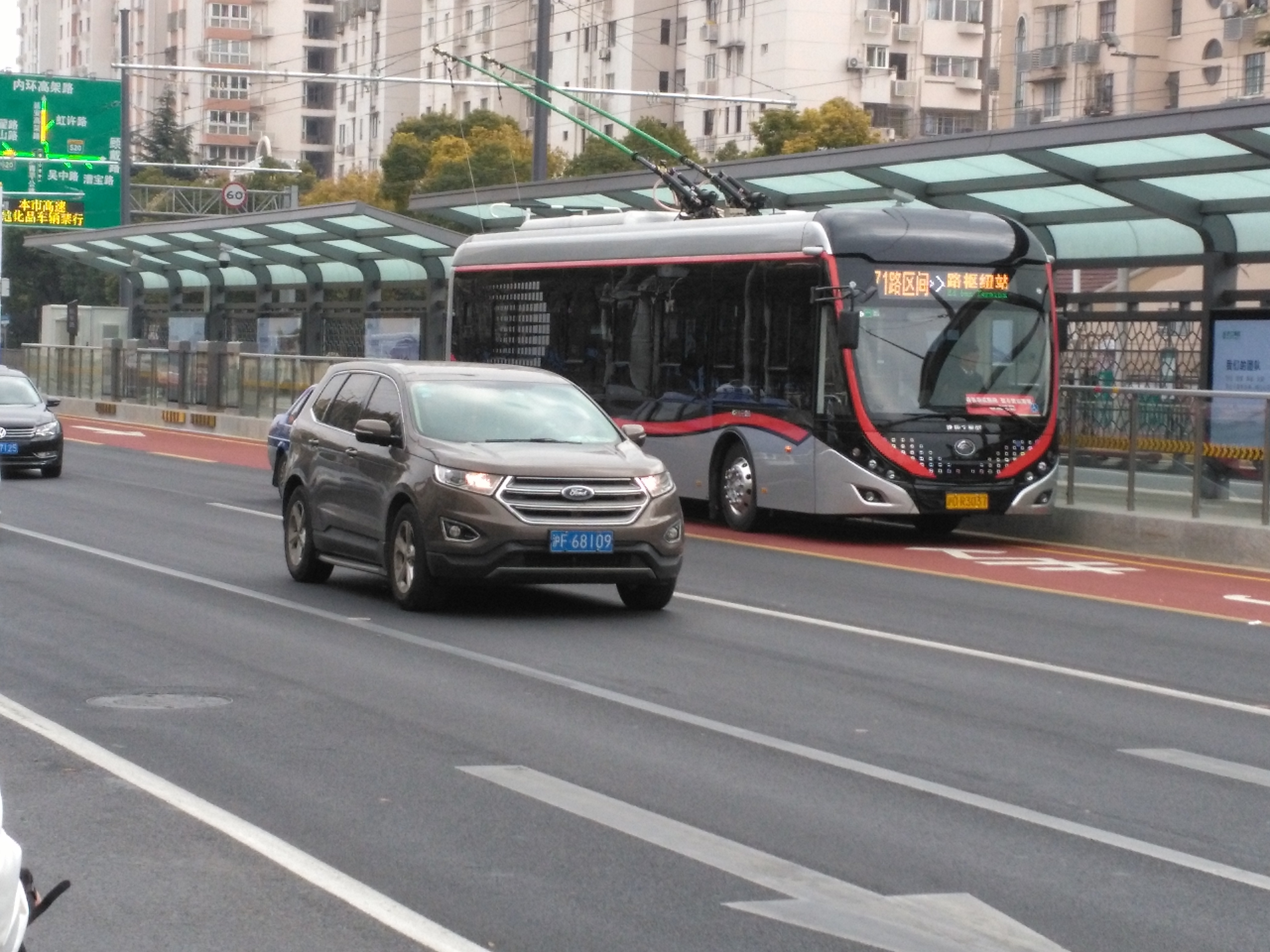 中文（中国大陆）: 延安路中运量系统工程航东路站